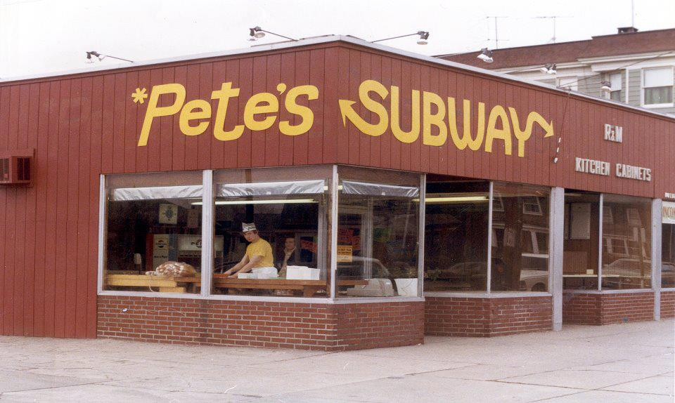 Uno de los primeros retaurantes de SUBWAY®